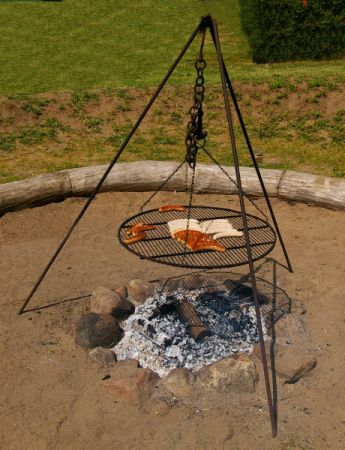 Schwenkgrill_neu